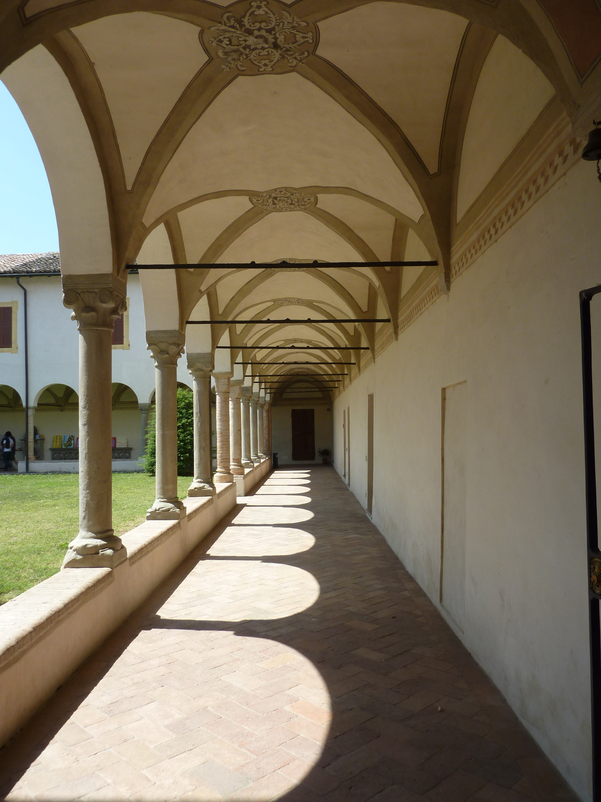 Un porticato del chiostro della Badia di Santa Maria della Neve a Torrechiara.